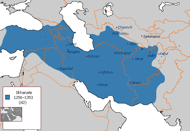 Ilkhanate in 1256–1353